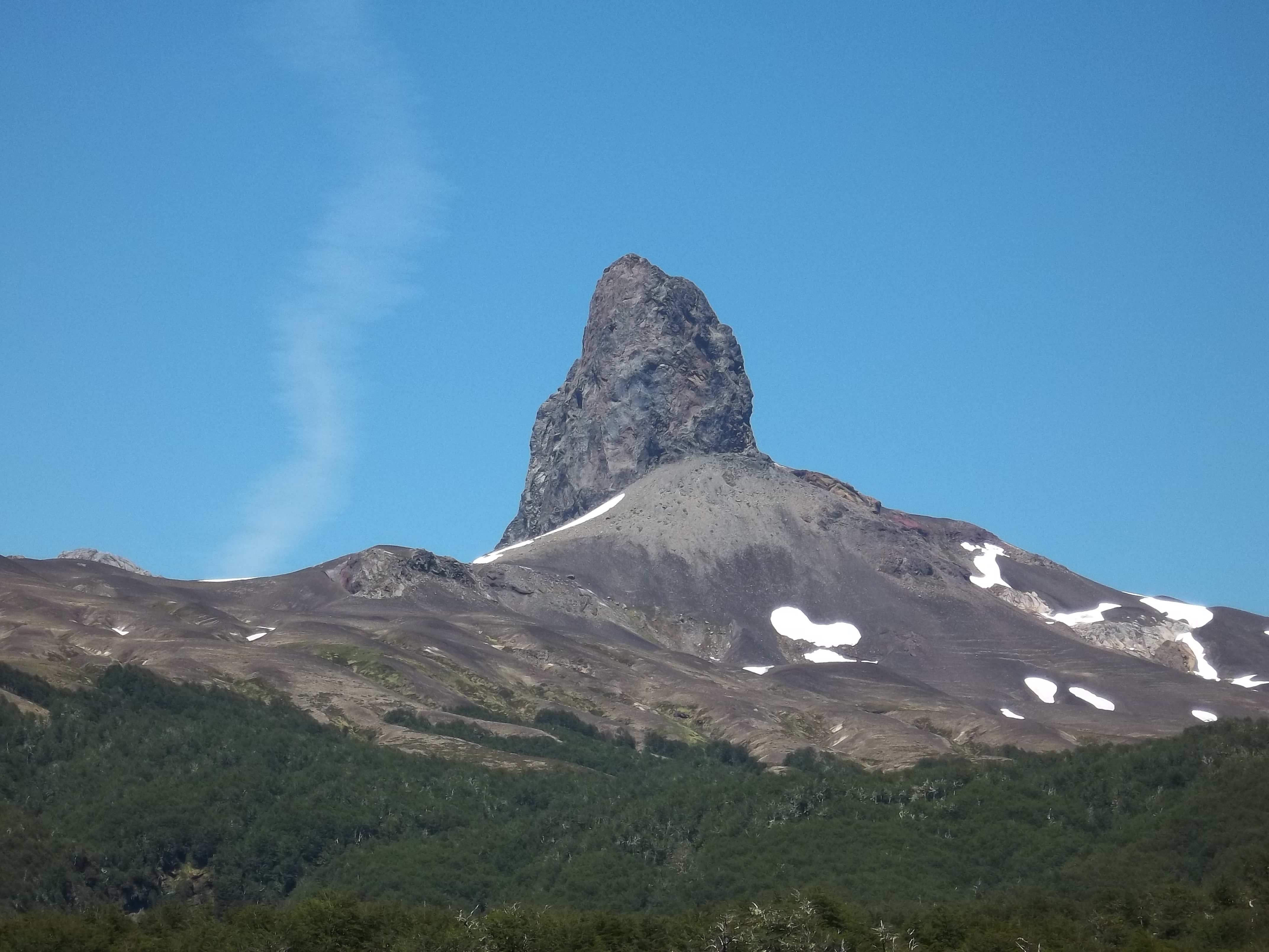 Cerro Pantojo ubicado en el límite internacional entre Chile y Argentina desde el mirador ubicado en la Ruta Nacional 231 cerca del paso internacional Cardenal Samoré en la provincia de Neuquén, Argentina.